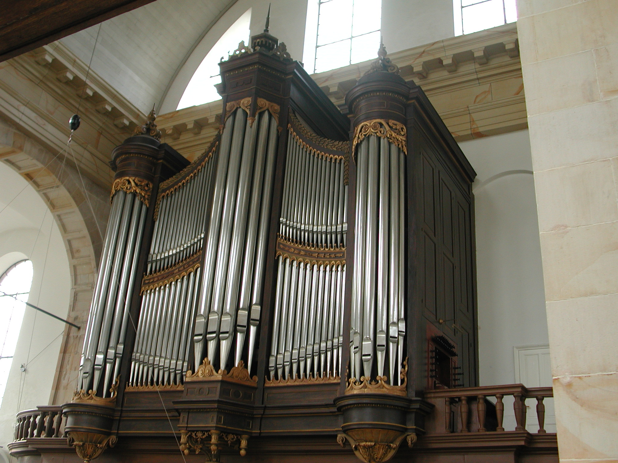 Amsterdam: Oosterkerk/East Church, orgel/organ